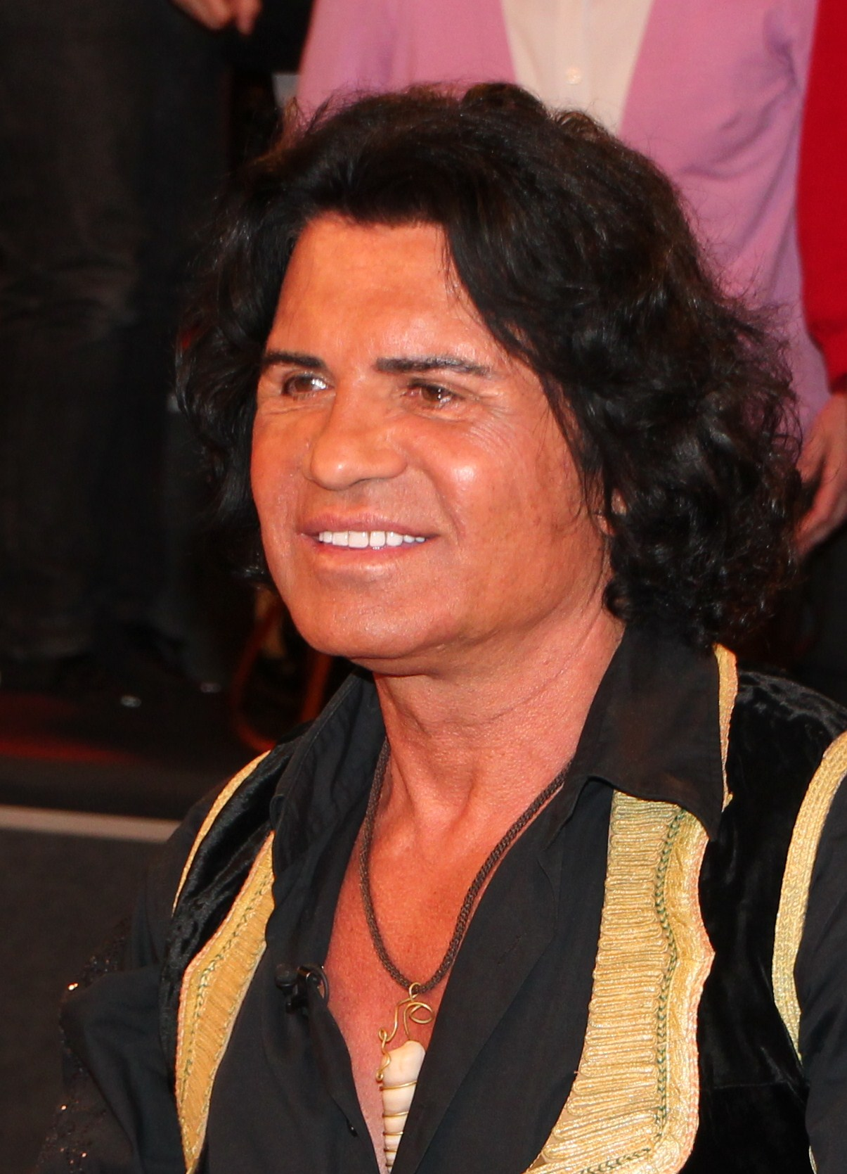 Ist ein deutschsprachiger Schlagersänger.